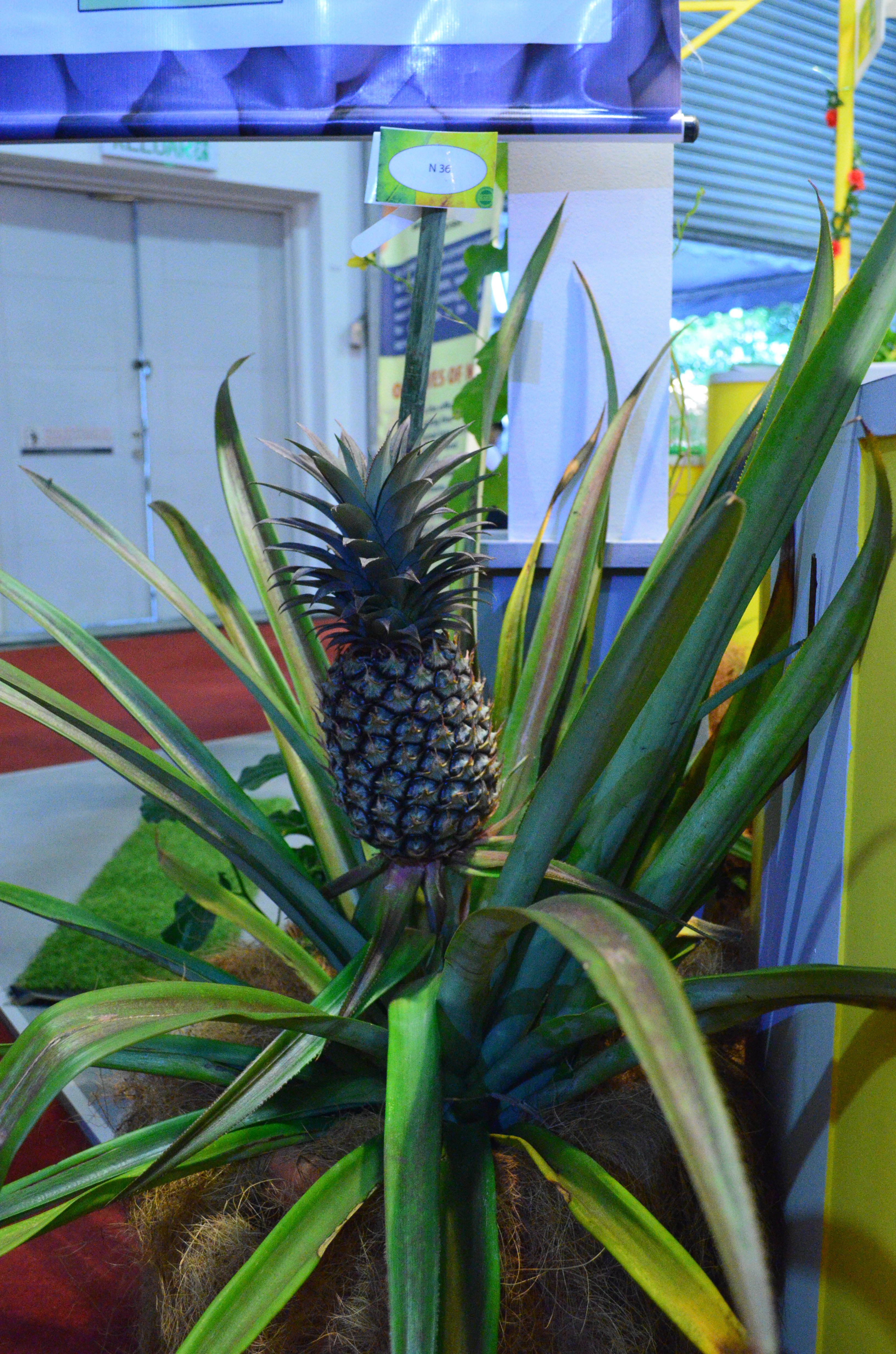 Nanas kultivar N36 di pameran MAHA 2012.